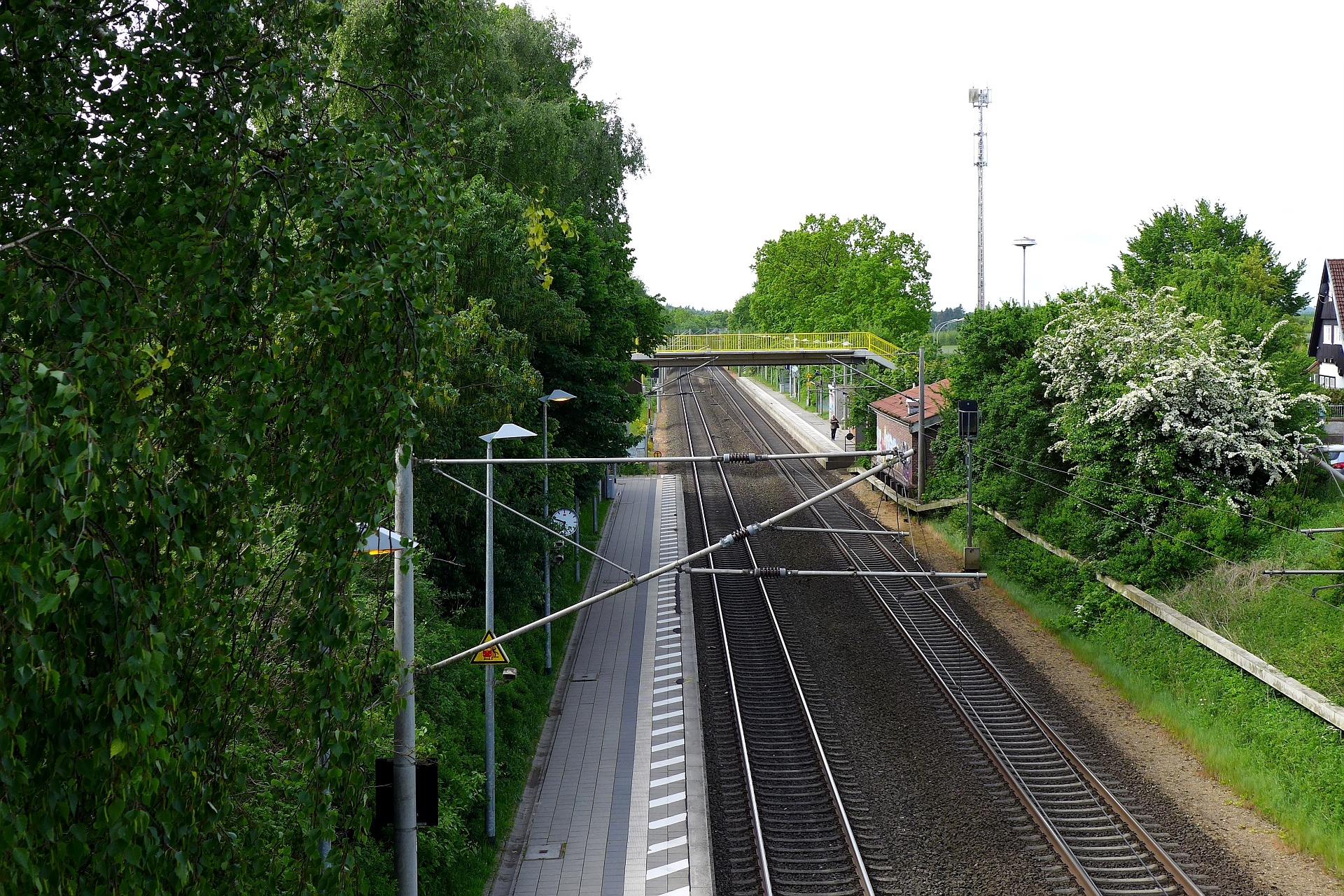 Bahnhof Klecken (Rosengarten (Landkreis Harburg)), Haltepunkt an der Bahnstrecke Hamburg-Bremen. Aufnahmedatum 2015-05.